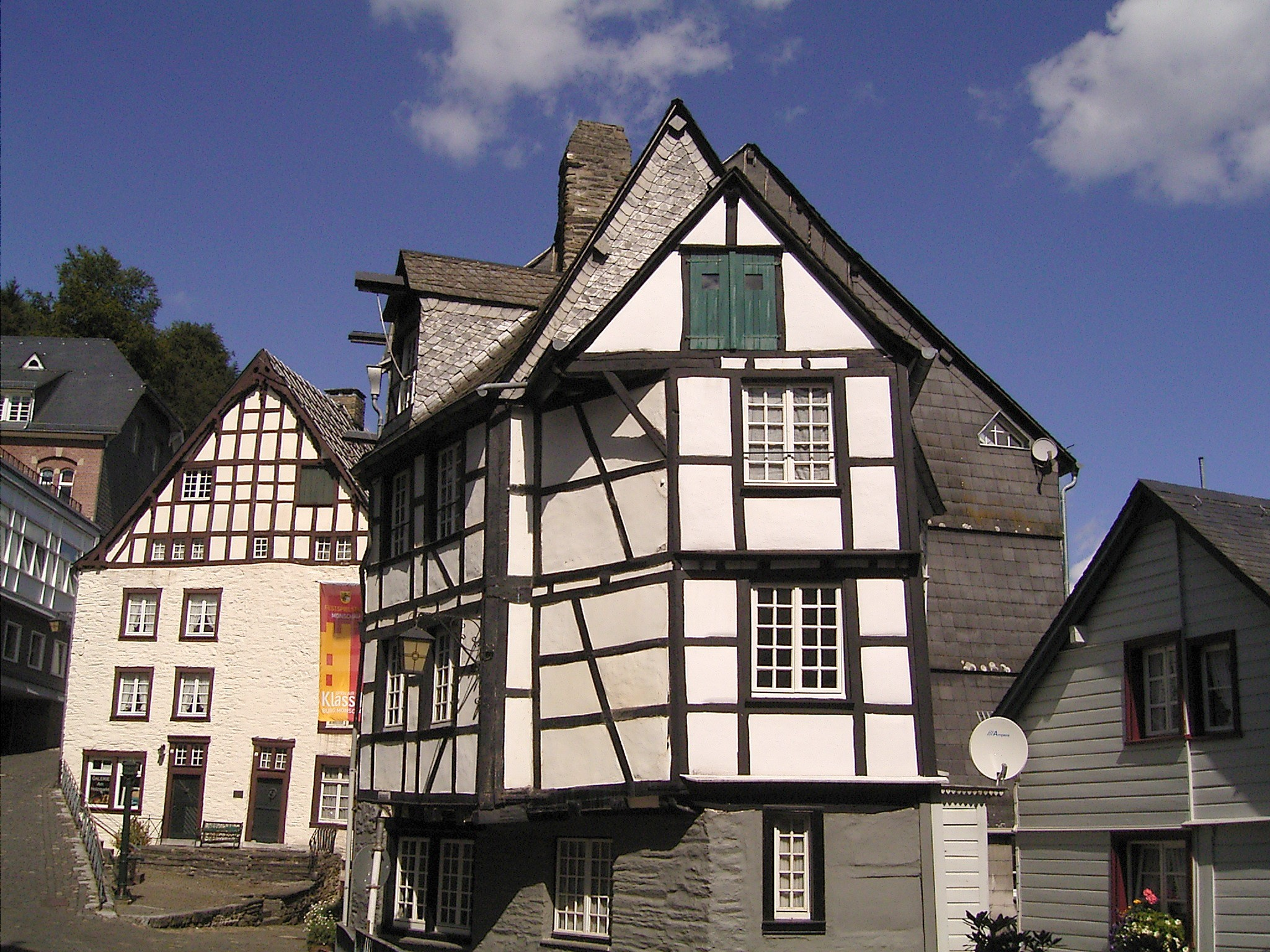 Monschau